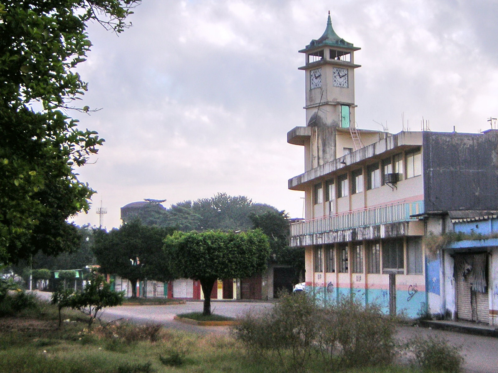 Biblioteca Municipal de Loma Bonita, Oaxaca, México